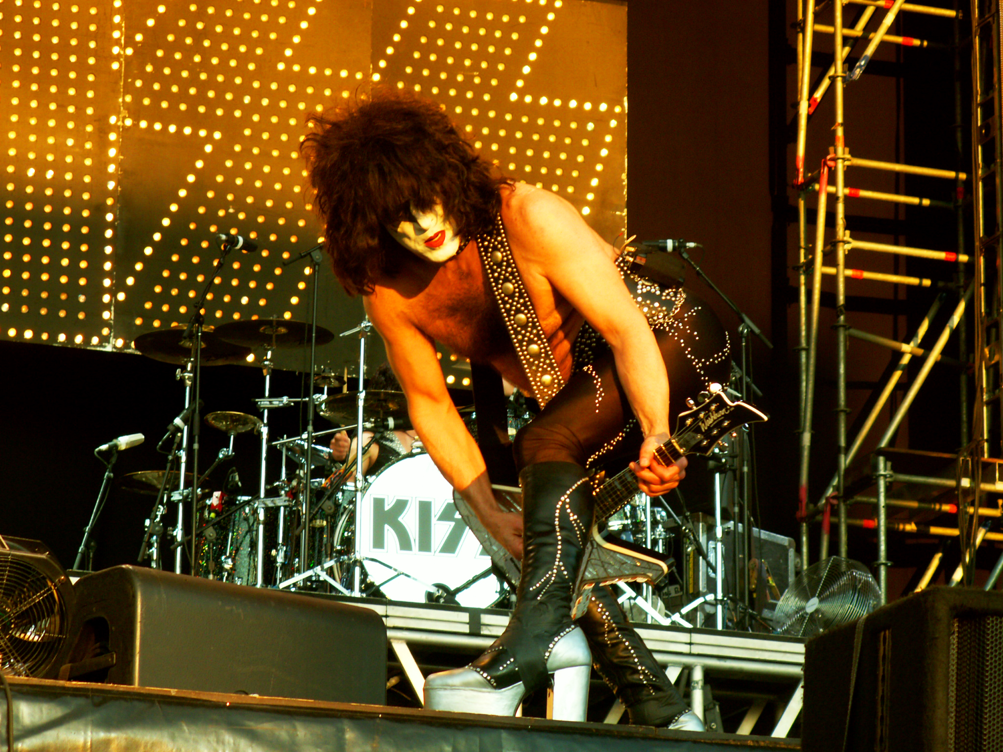 Paul Stanley - Nijmegen 2008